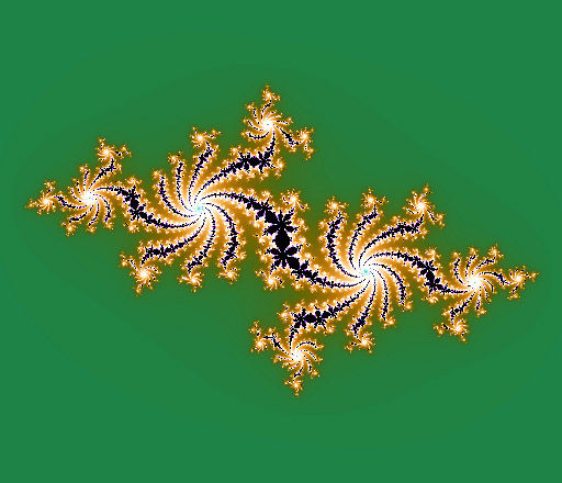 Juliamängden, vid C = [-0.668683, 0.350684]. Detaljbild: Bild:Juliamängden (-0.668683, 0.350684) 2.jpg Kategori:Bilder av fraktaler